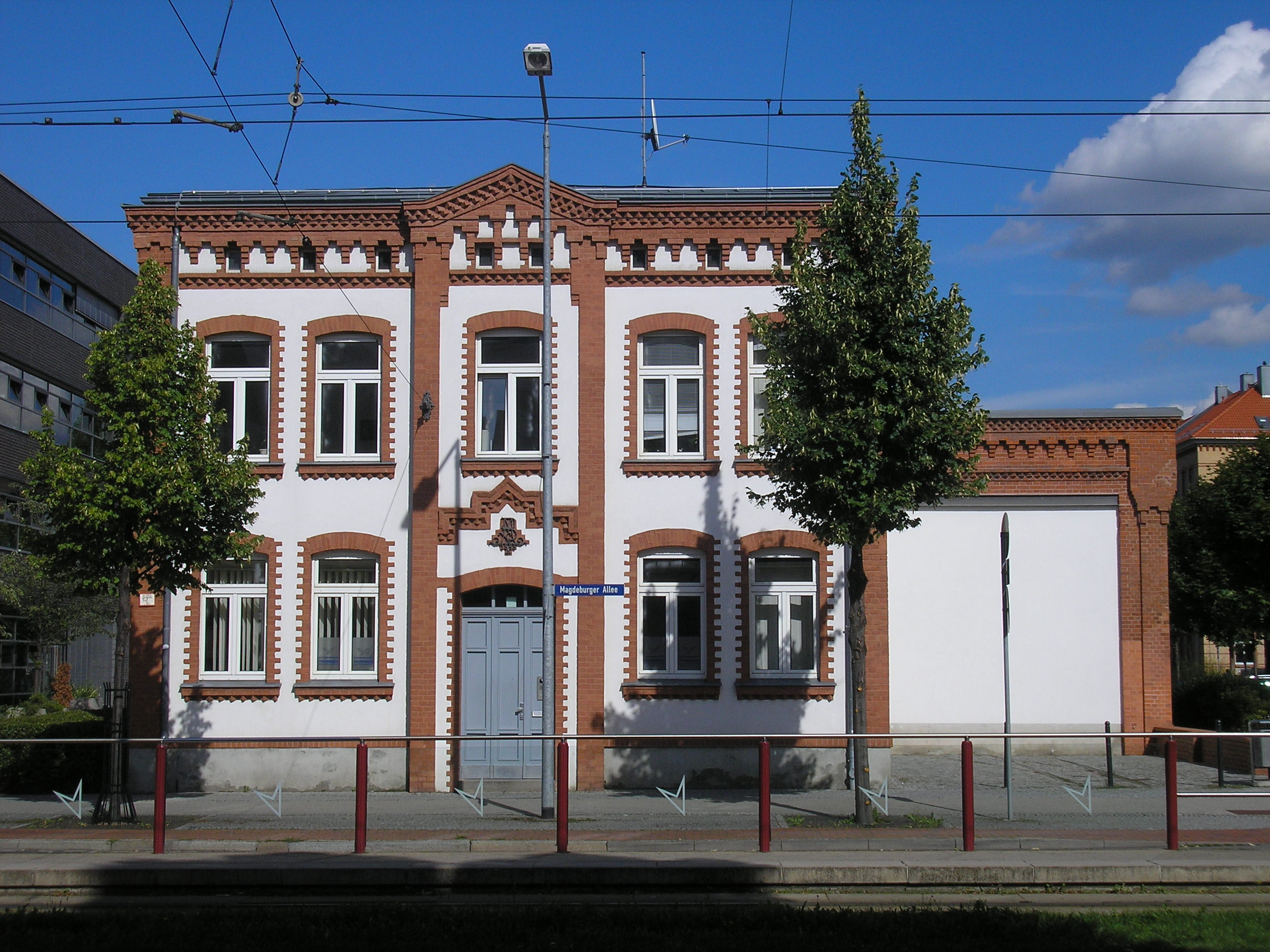 Ehemalige Anlagen der Straßenbahnverwaltung in der Magdeburger Allee in Erfurt.